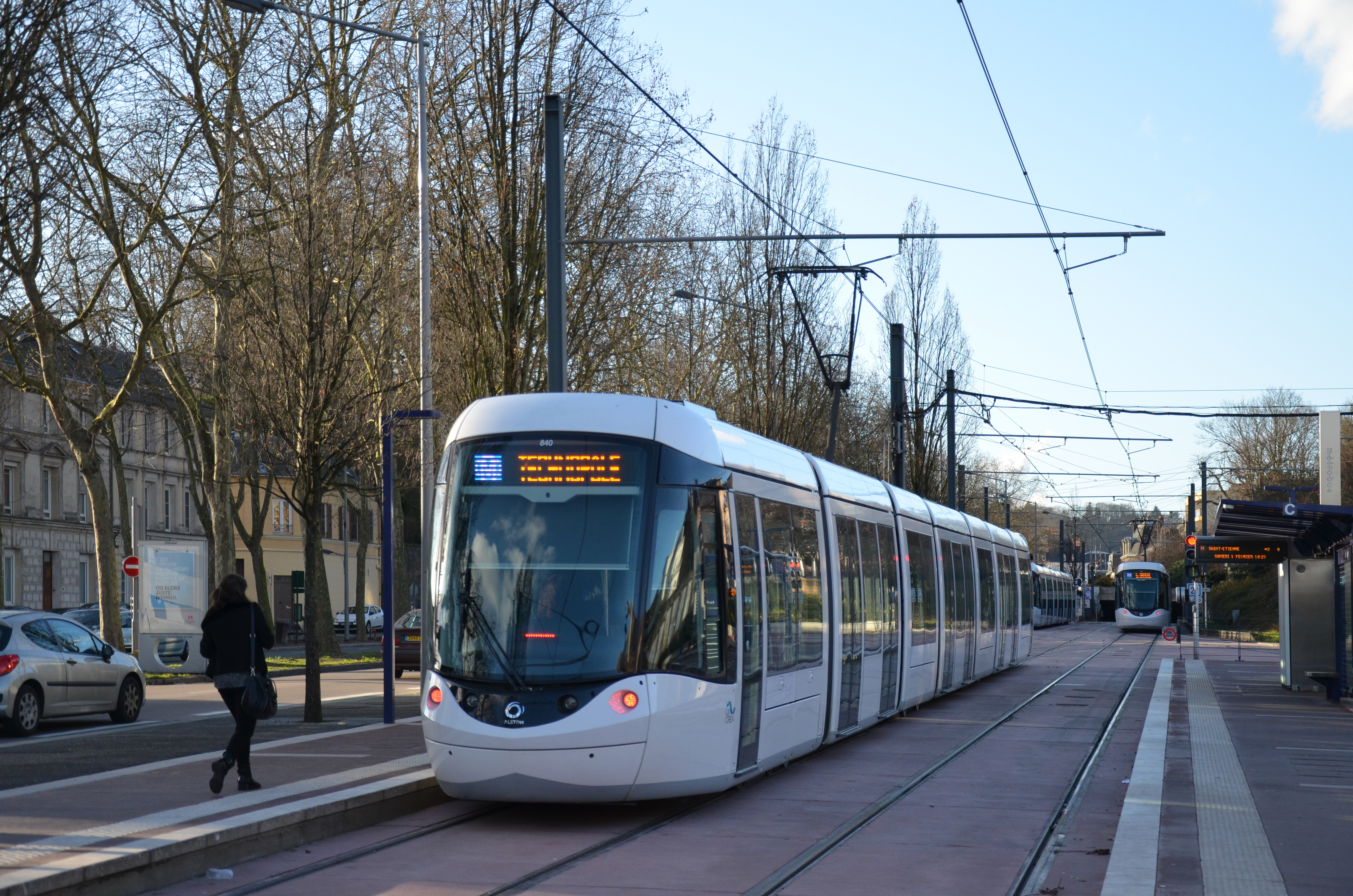 Alstom Citadis 302 n°840 sur le "Métro" de Rouen, à la station terminus Boulingrin en direction de Technopôle.